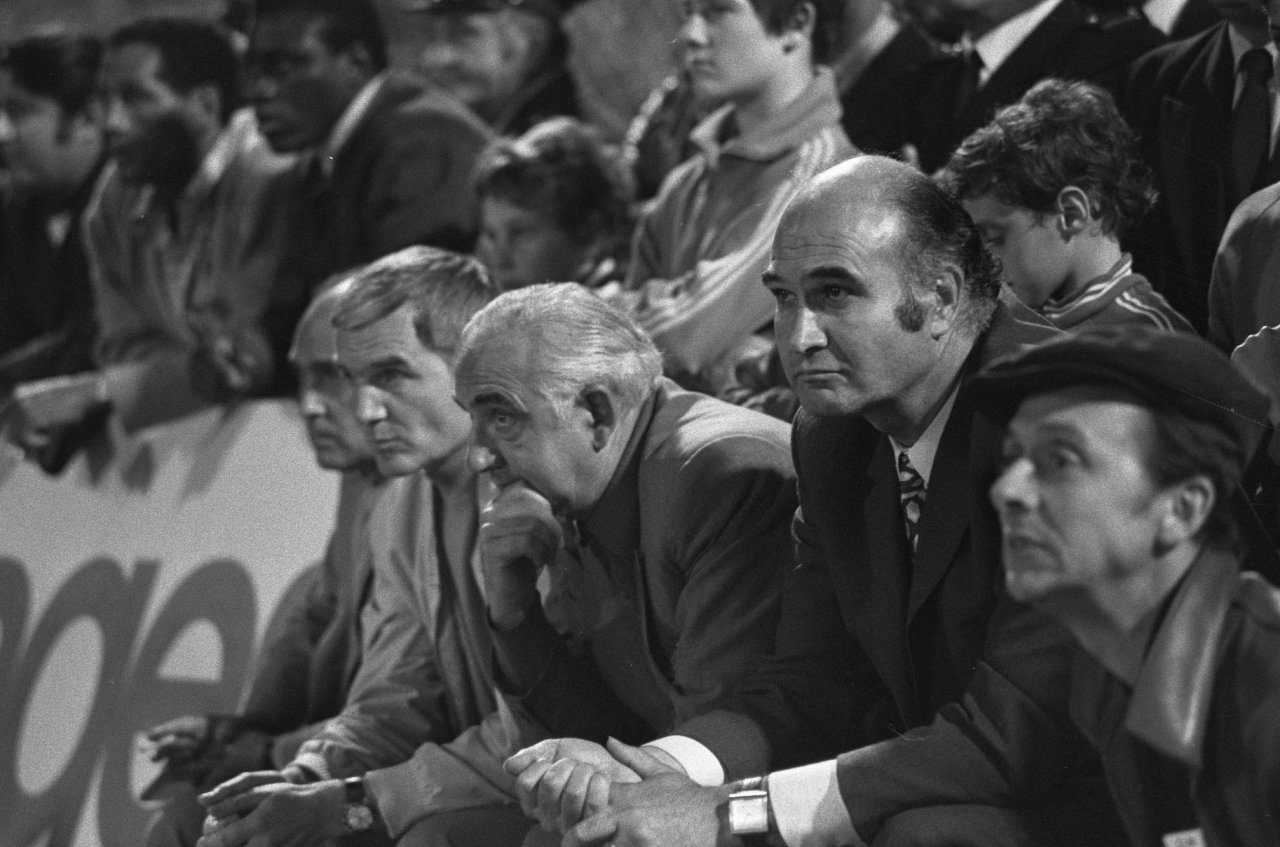 Dirigeants de l'Olympique de Marseille lors du match OM-Ajax du 20 octobre 1971.